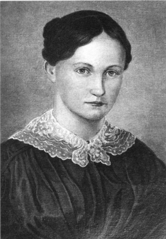 Helene Löhe, geborene Andreae (1819–1843). 1837 mit Wilhelm Löhe verheiratet.